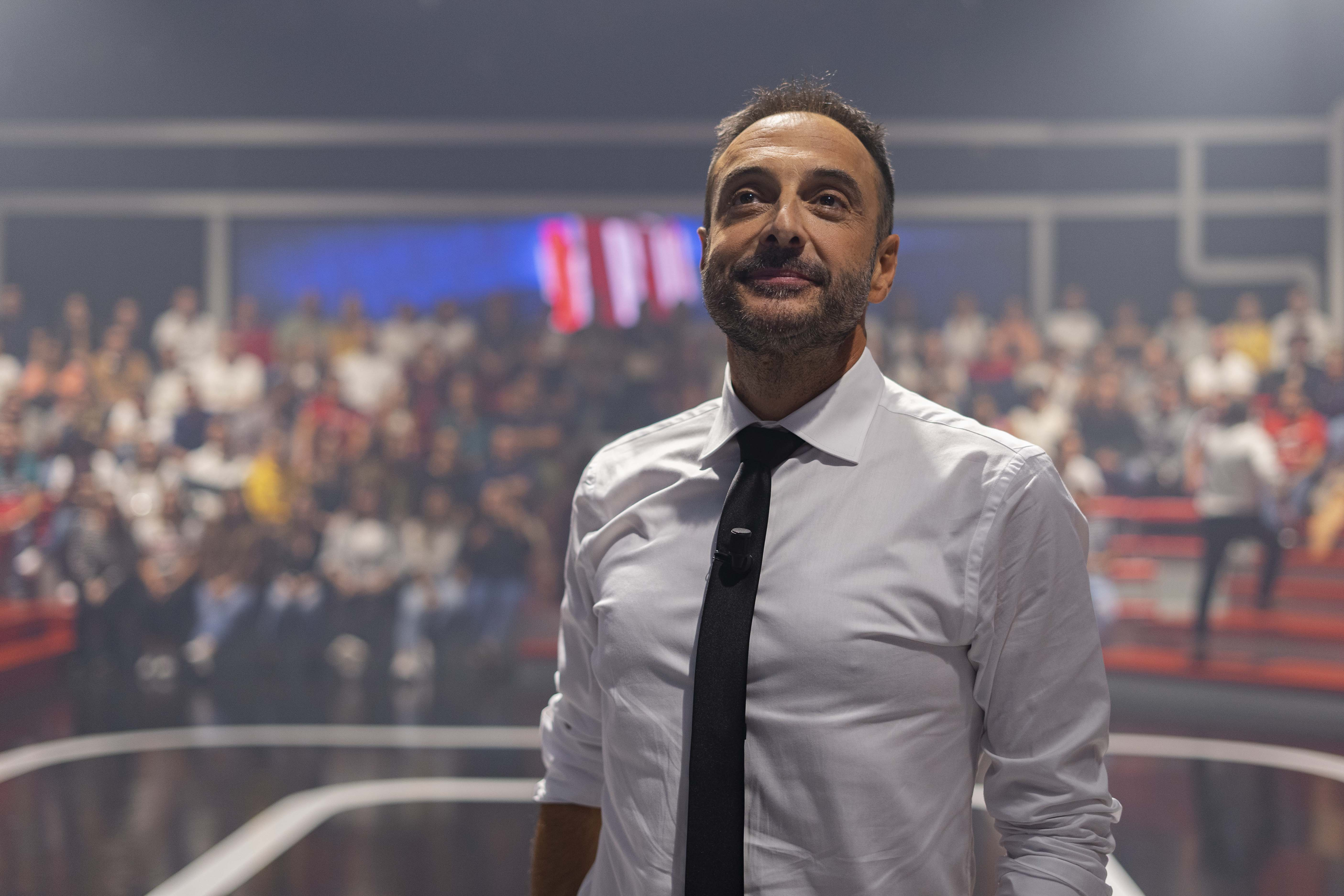 Roberto Vilar ao remate dunha retransmisión do Land Rober Tunai Show